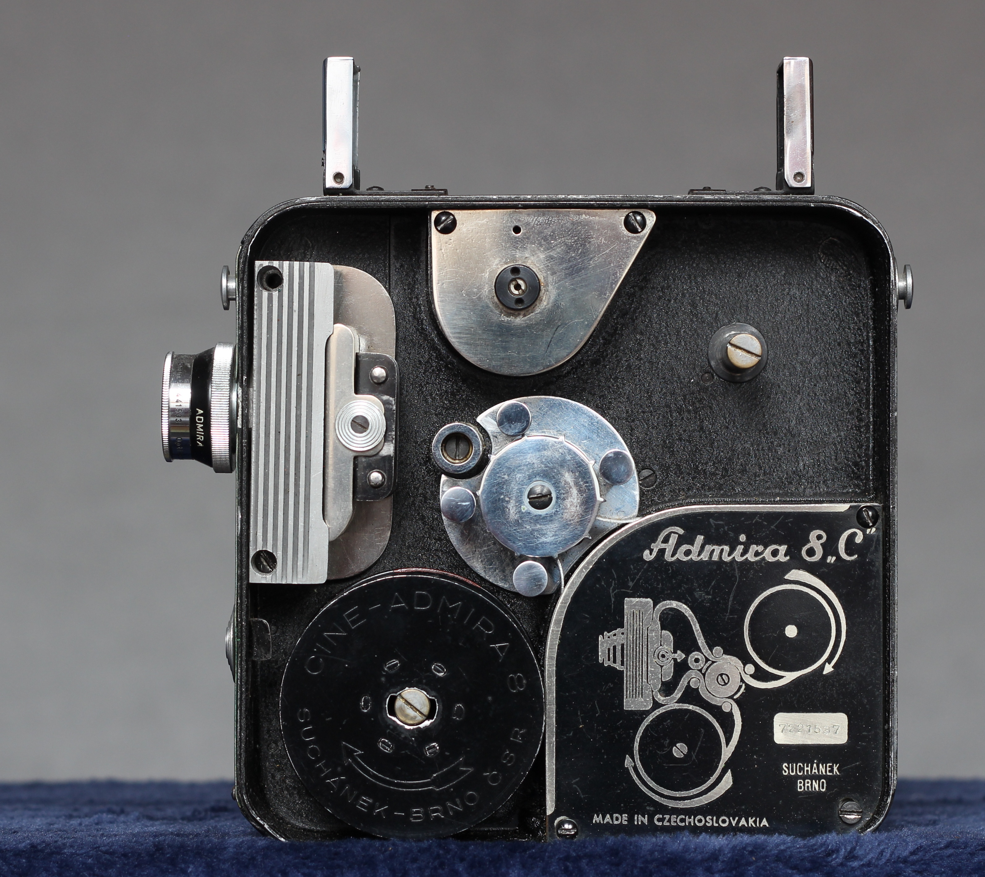 Admira 8C, výroba: Jindřich Suchánek Brno, pohled do filmové dráhy